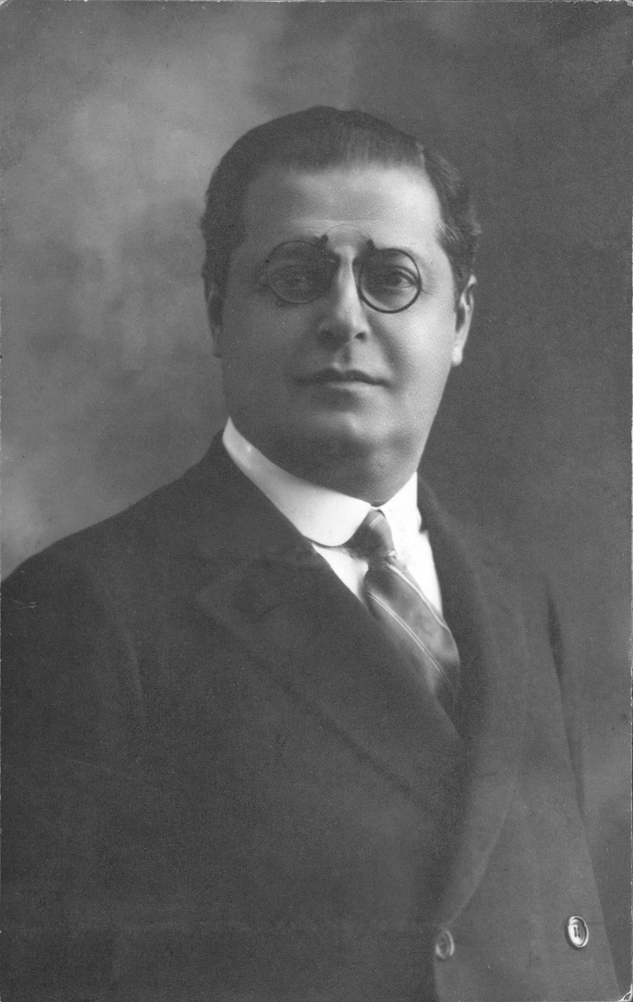 Emir Emín Arslán (ca. 1910), Archivo General de la Nación, Departamento de Documentos Fotográficos, República Argentina, inventario 51684